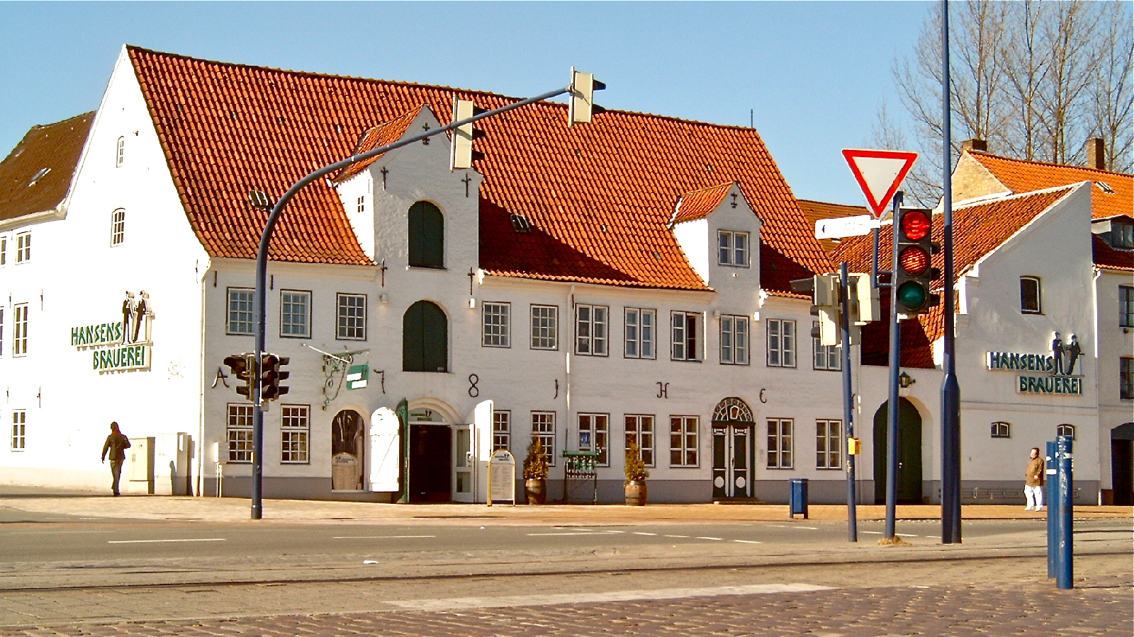 Foto: Hansens Brauerei in Flensburg Gasthausbrauerei